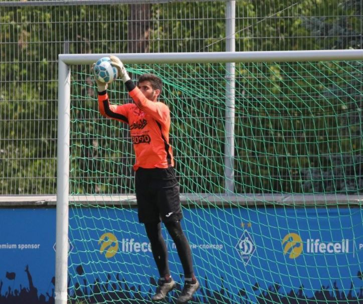 پرونده مرتبط با ابولفضل درویشوند در تمرینات پرسپولیس در کمپ باشگاه اوکراینی (دینامو کیف) پرونده نسخه ویرایش شده